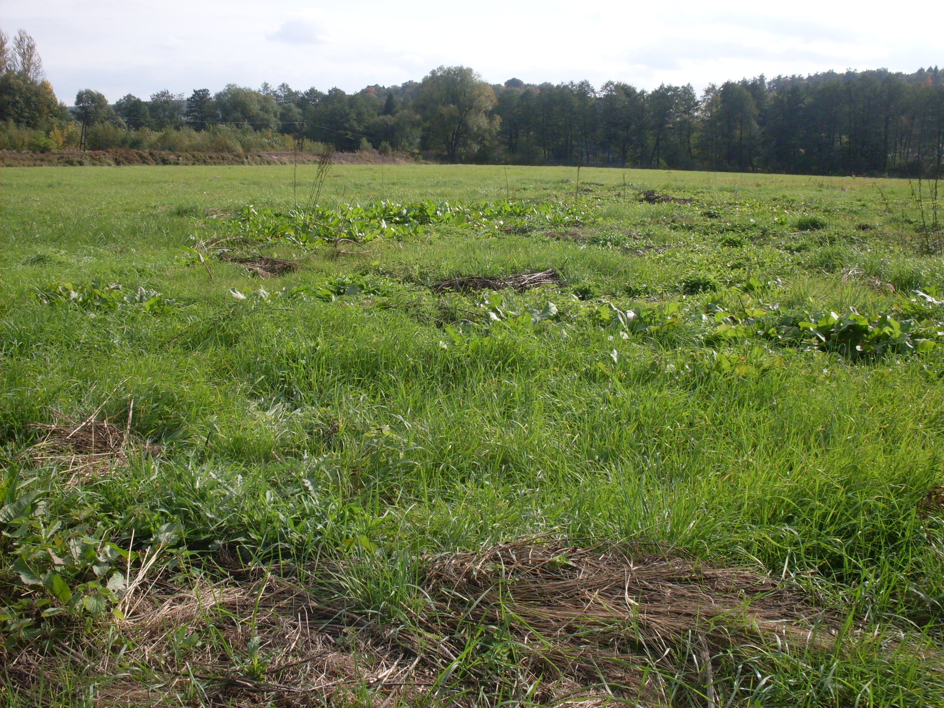 Tereny dawnego Hipodromu Potockich w Krzeszowicach widok od północy